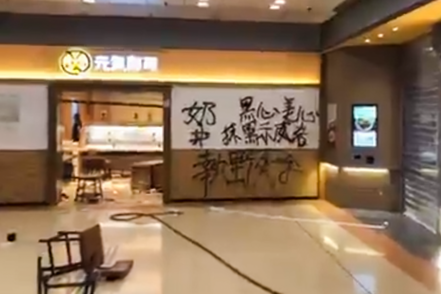 9点过后，秀荗坪商场内有些骚动，许多人跑入商场内。一些蒙面黑衣人开始“装修”美心集团旗下的元気寿司以及另外一家被喷写为“红色资本”的店铺。有示威者呼吁参与“装修”的人士赶紧离开。